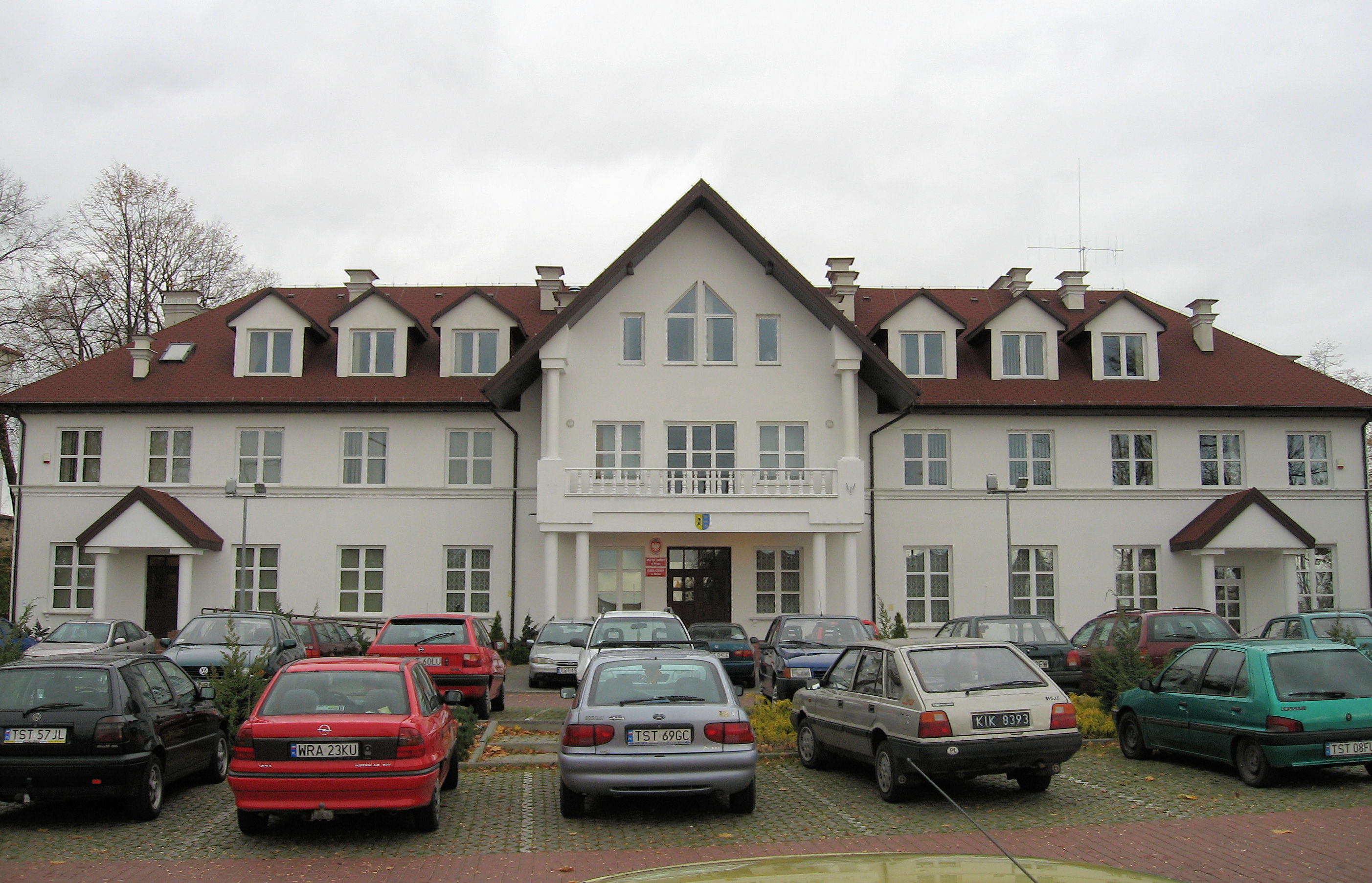 Budunek Urzędu Gminy w Mircu